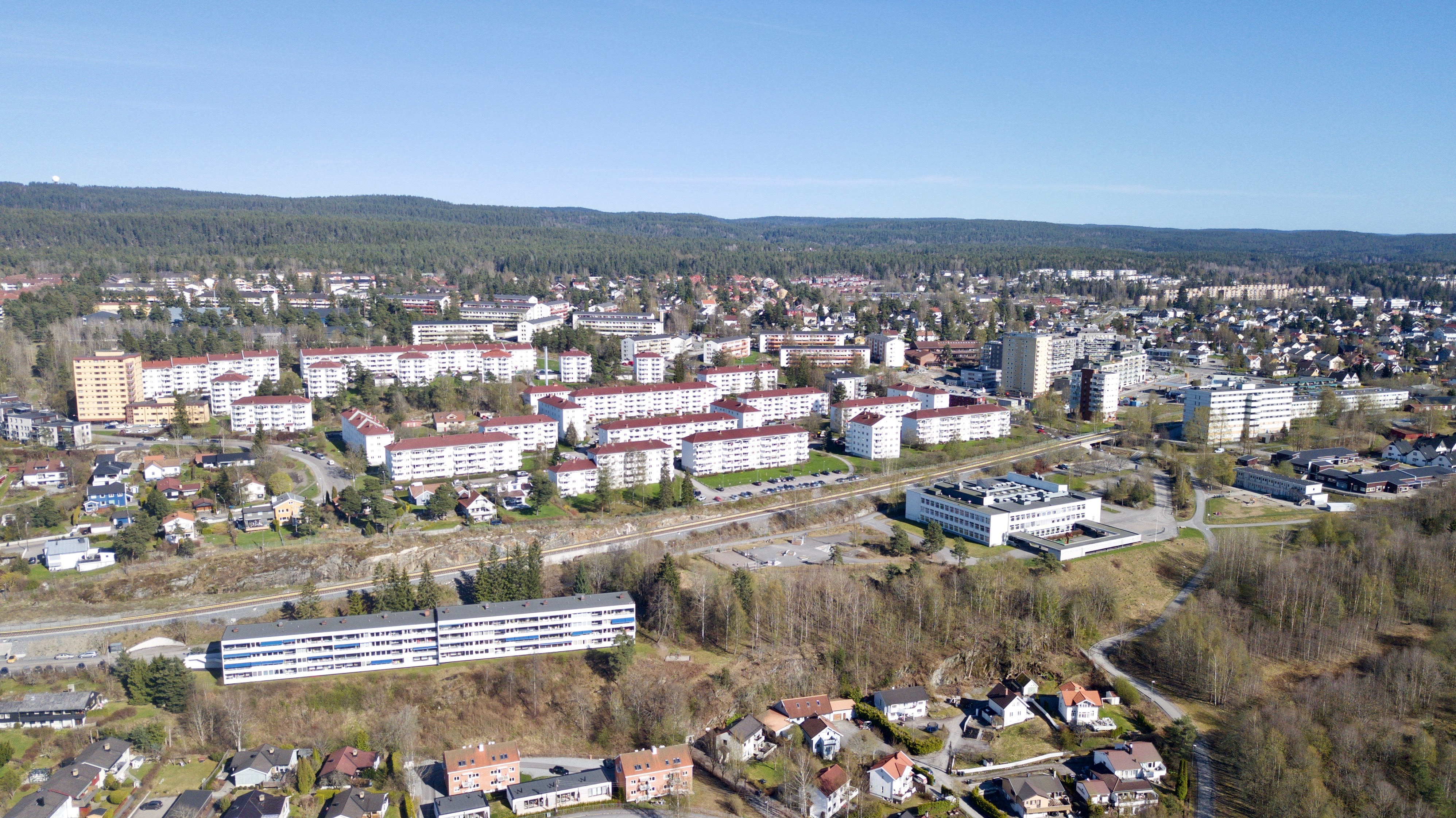 Oppsal i Oslo.